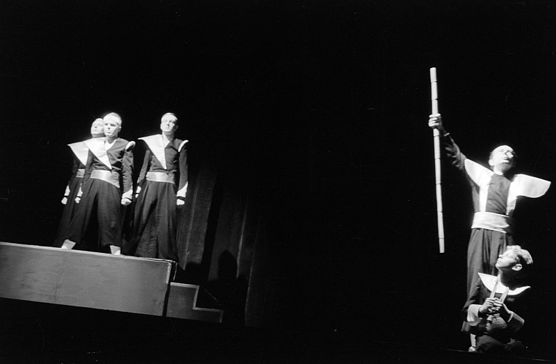 Original image description from the Deutsche Fotothek Szenenbilder